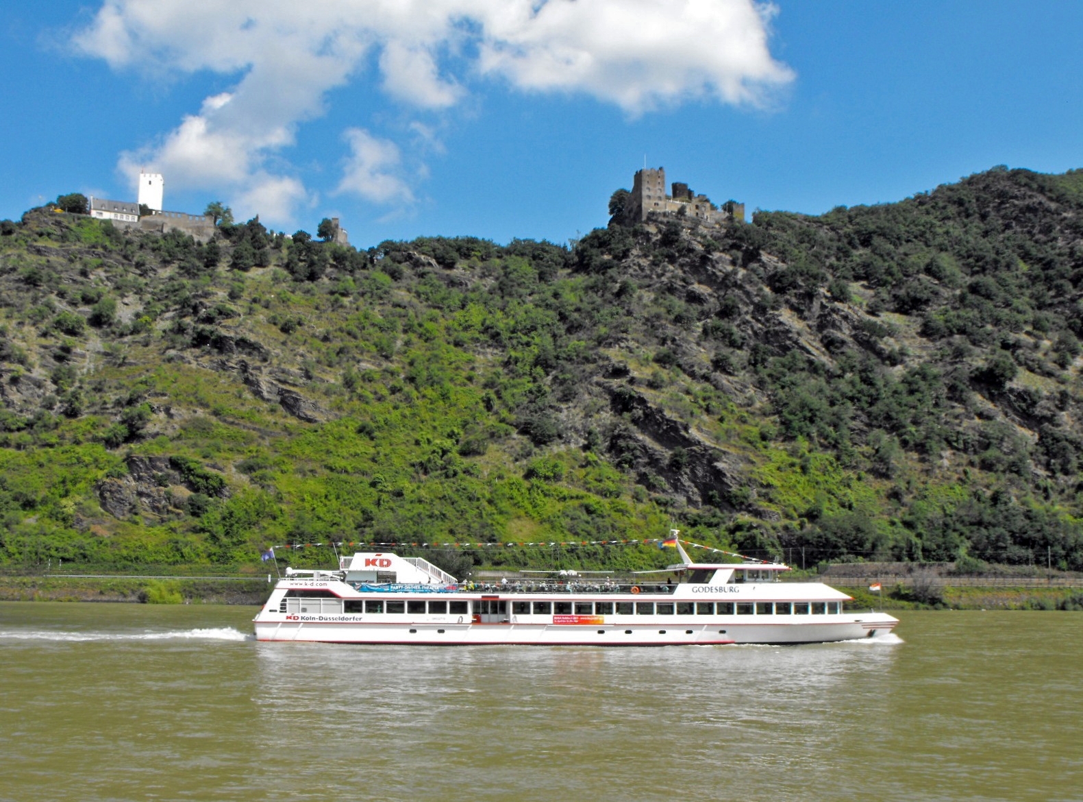 Tagesausflugschiff Godesburg von der Köln-Düsseldorfer im Mittelrheintal vor den Burgen Sterrenberg und Liebenstein (Die feindlichen Brüder).